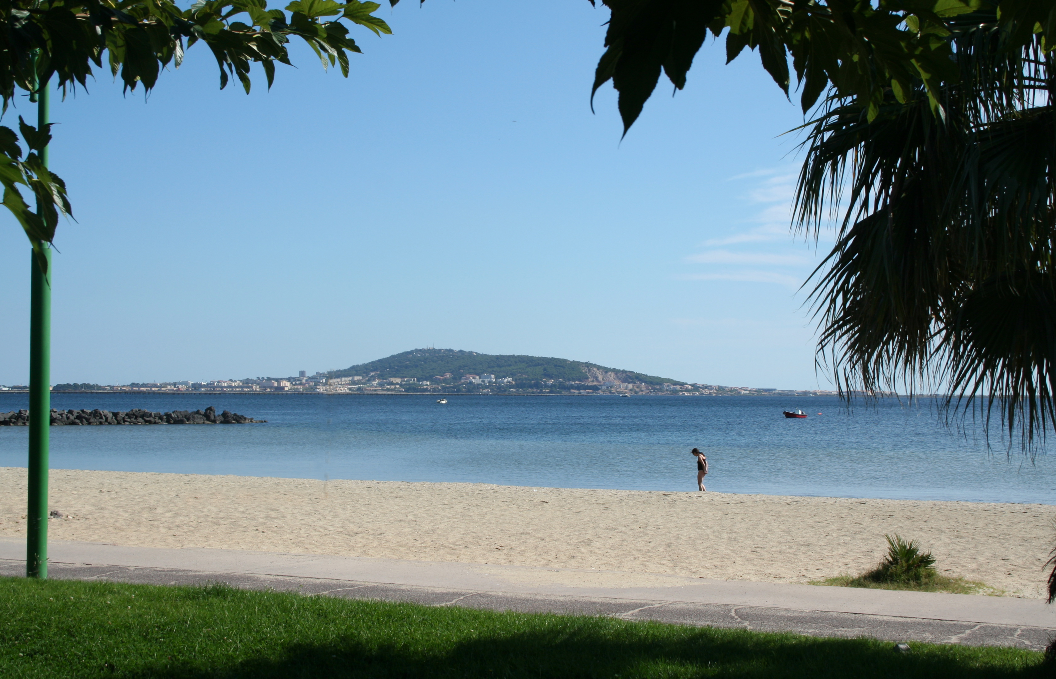 Mèze (Hérault) - Plage, étang de Thau et vue sur la colline de St-Clair (Sète).